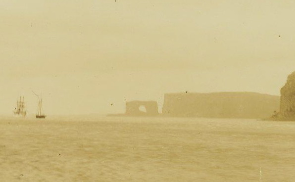 Port-Christmas (île Kerguelen) le 2 janvier 1893. L'aviso-transport française l'Eure commandée par le capitaine de frégate Lieutard et la goélette américaine Francis Allyn de John Fuller sont présent dans la baie de l'Oiseau pour le renouvellement de la prise de possession solennelle de l'archipel par la France. L'arche des Kerguelen est visible au fond de la baie.